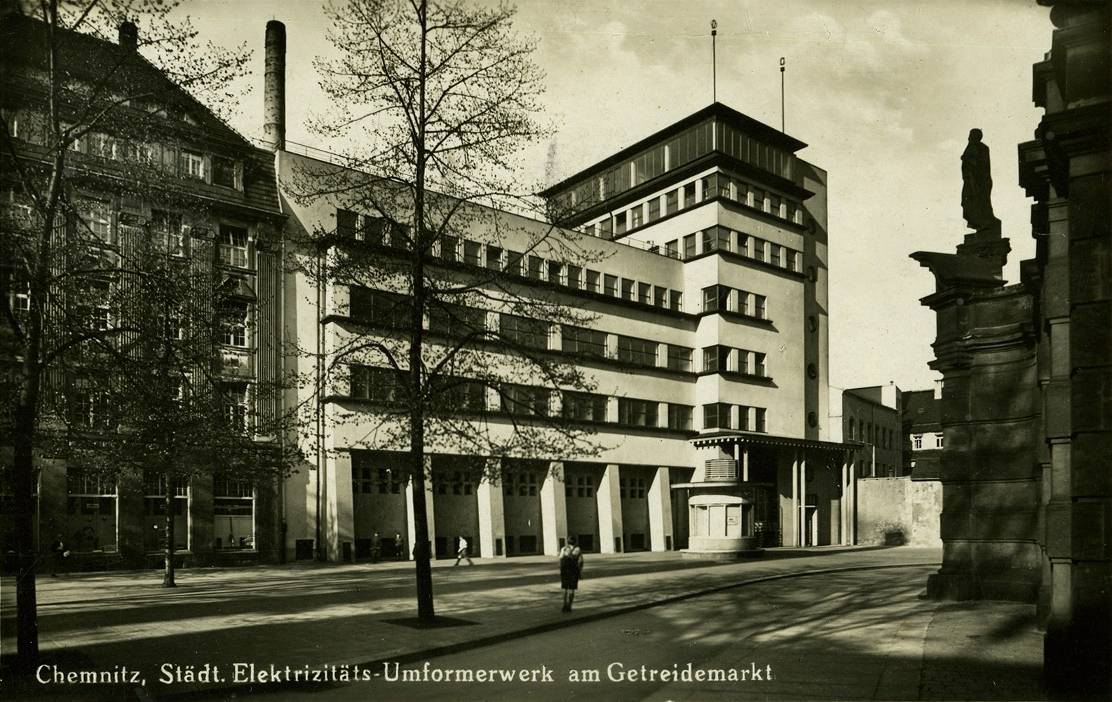 Ansicht des Städtischen Elektrizitäts-Umformwerks am Getreidemarkt in Chemnitz. Architekt: Friedrich Wagner-Poltrock, Baujahr 1929; heute umgenutzt zur Jugendherberge. Rechts im Bild die einstige St.-Pauli-Kirche.